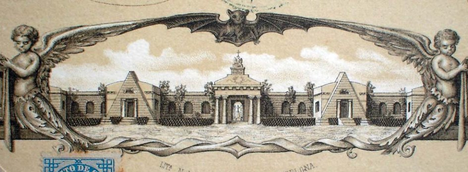 Fachada del Cementerio de Poblenou, dibujo de Antonio Ginesi (1818).